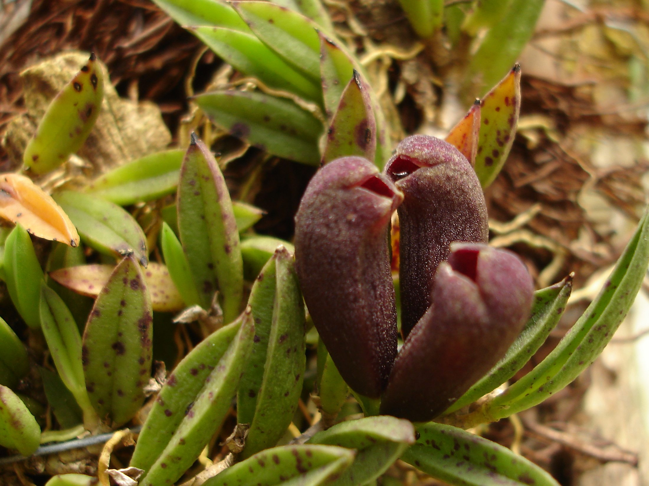 Photos by Alessandro Ferreira & Dalton Holland Baptista for Orchidstudium